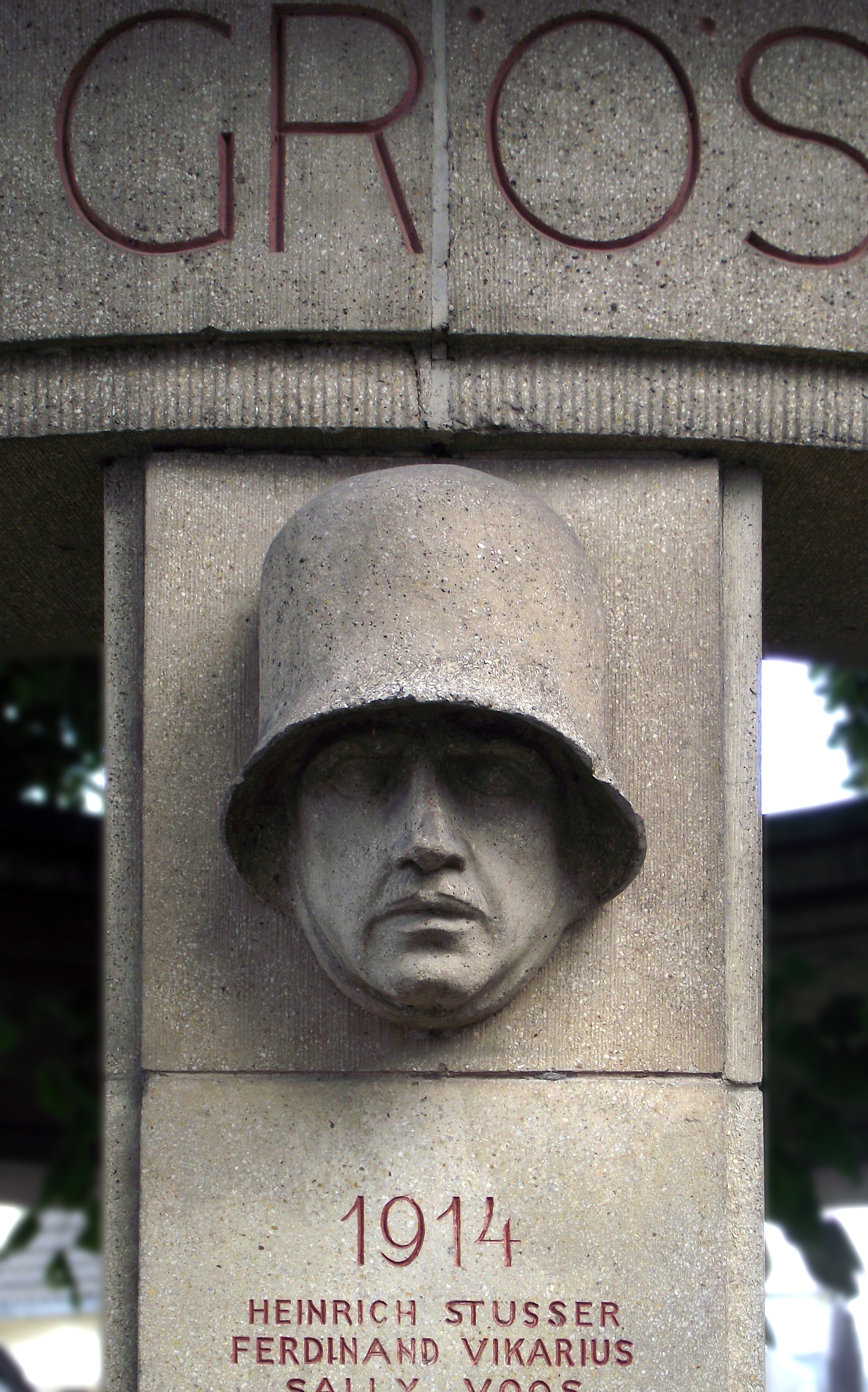 Kriegerdenkmal (Kriegerehrenmal) in Kessenich, 2012, Detail; Bonn-Kessenich